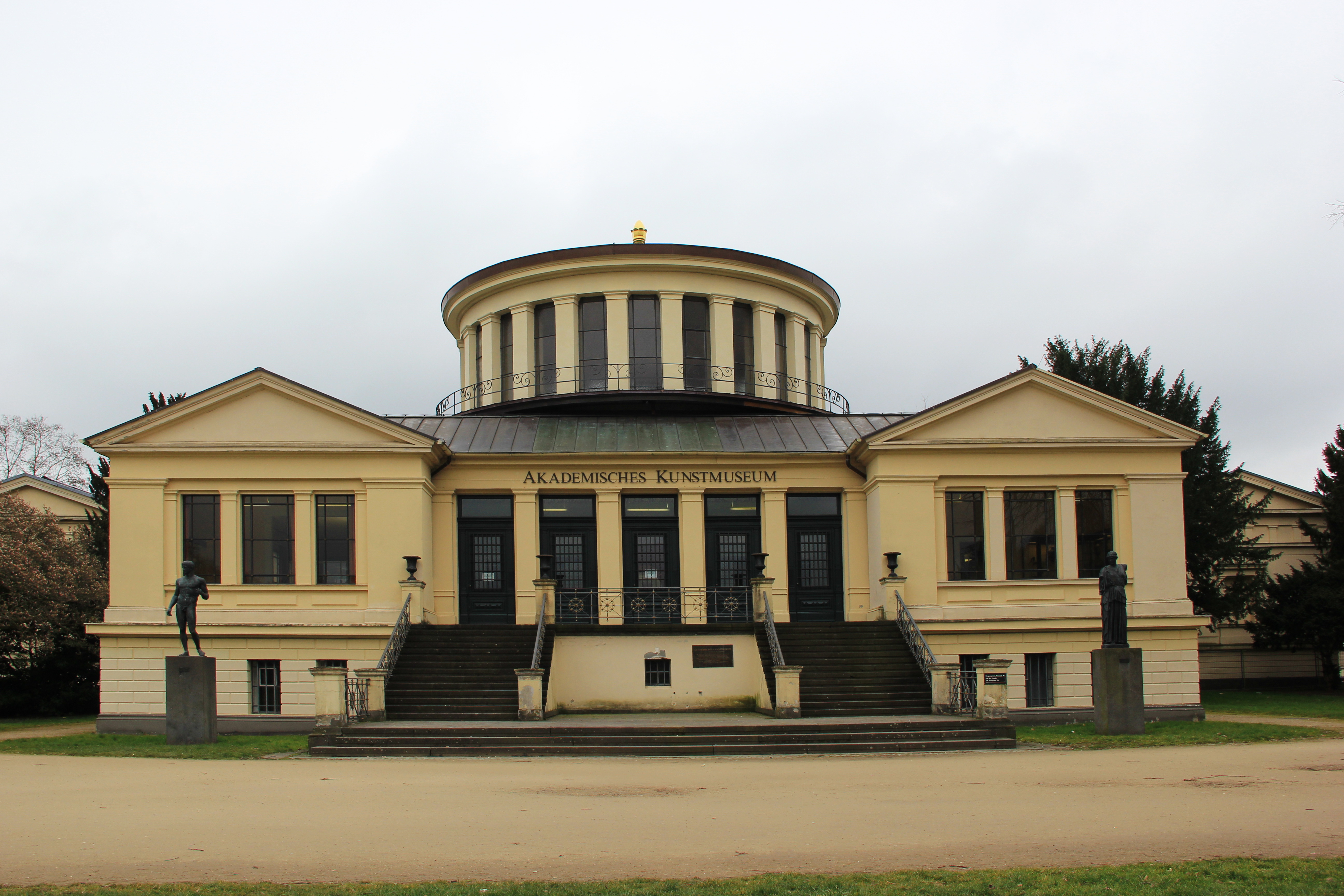 Das Akademische Kunstmuseum ist das älteste Bonner Museum. Es beherbergt die Antikensammlung der Universität Bonn mit über 500 Abgüssen antiker Statuen und Reliefs und über 2000 Originalen. Es befindet sich in einem klassizistischen Bau am südlichen Ende des Hofgartens direkt gegenüber dem Kurfürstlichen Schloss.